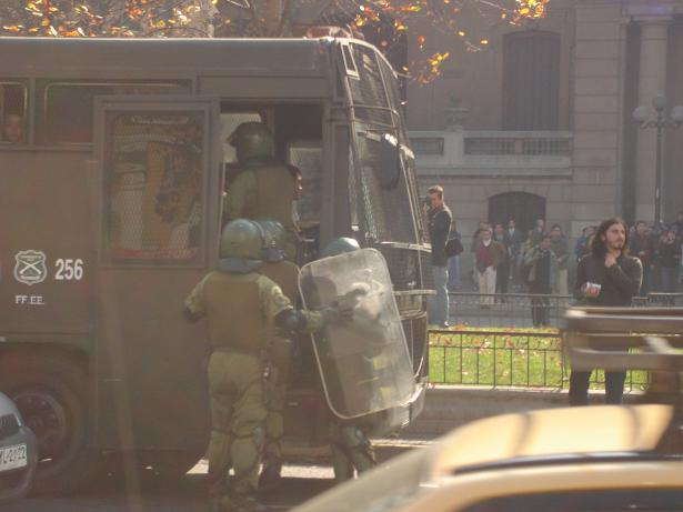 Carabineros frente a la Universidad de Chile durante protestas escolares chilenas de 2006